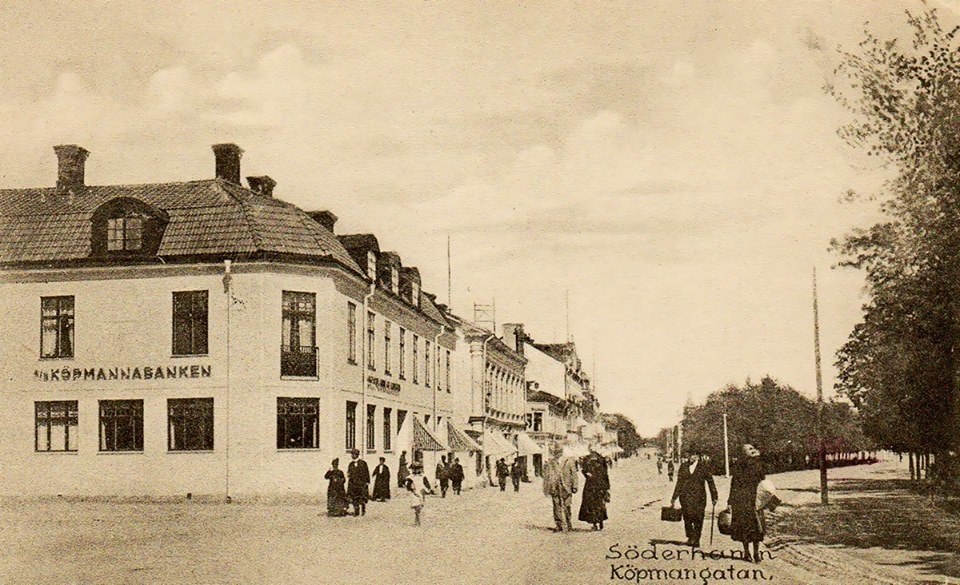 Köpmannabanken i Söderhamn